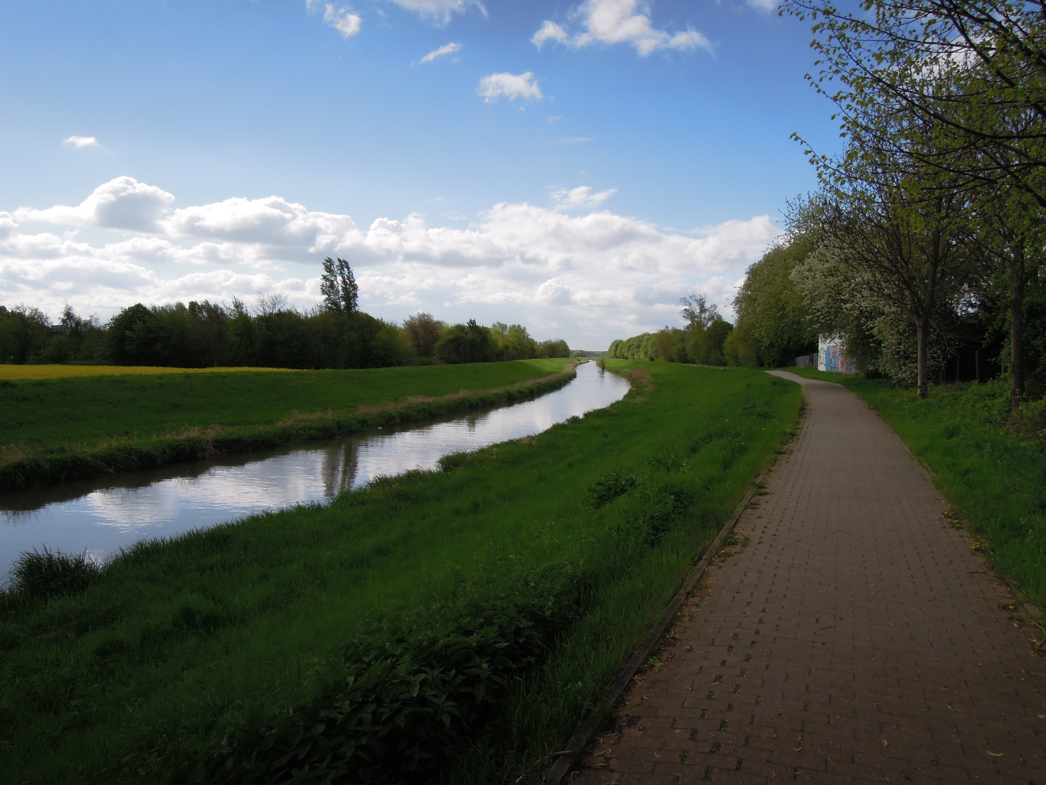 Pleiße in Markkleeberg südlich der Seenallee (S46) Ende April 2018